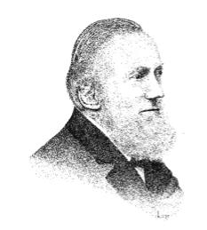 Portret Christiaan Messemaker (1821-1905)